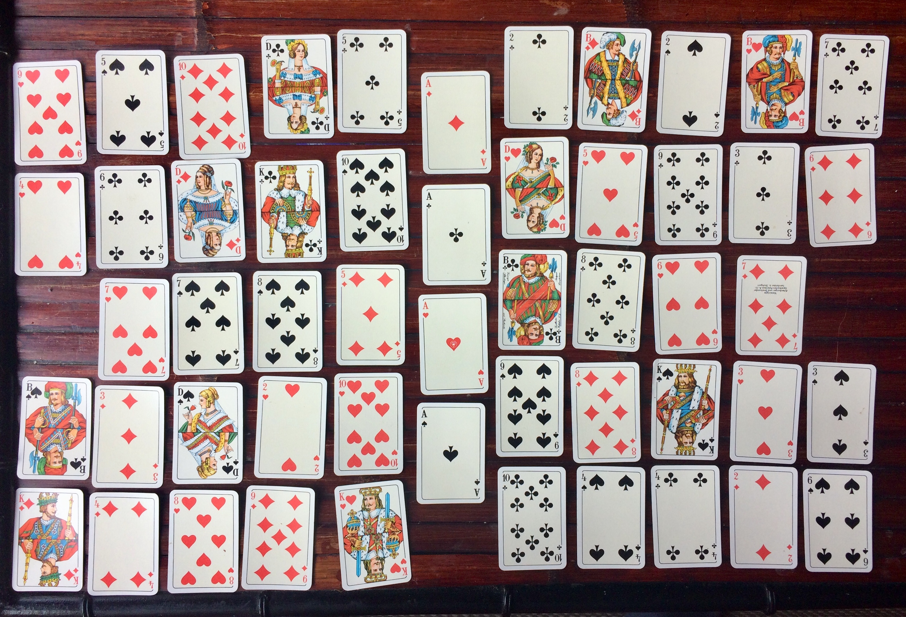 Auslage einer Schmetterlingspatience